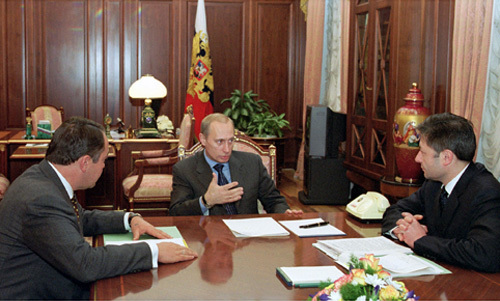 МОСКВА, КРЕМЛЬ. С Министром по делам печати, телерадиовещания и средств массовых коммуникаций Михаилом Лесиным и Министром по делам связи и информации Леонидом Рейманом (справа).